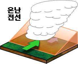 온난전선 모식도